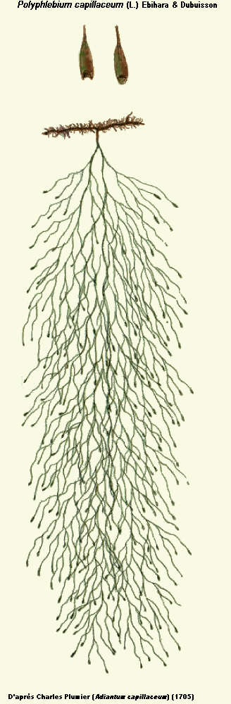 Polyphlebium capillaceum (L.) Ebihara & Dubuisson - Dessin de Charles Plumier - Traité des fougères de l'Amérique - Paris, 1705 - Planche 99 D reprise par D. Prévôt